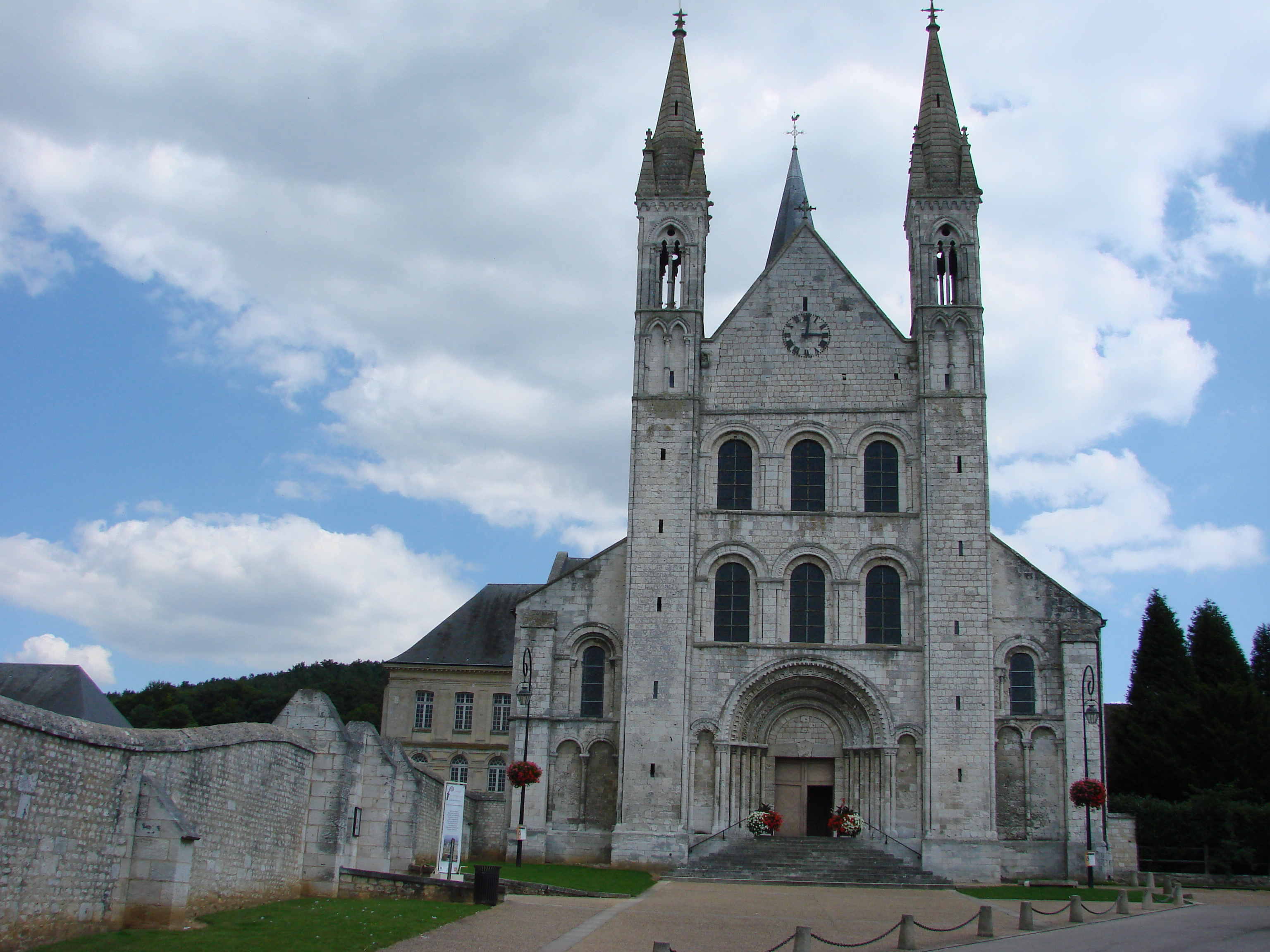 Abbaye Saint-Georges de Boscherville, Normandie